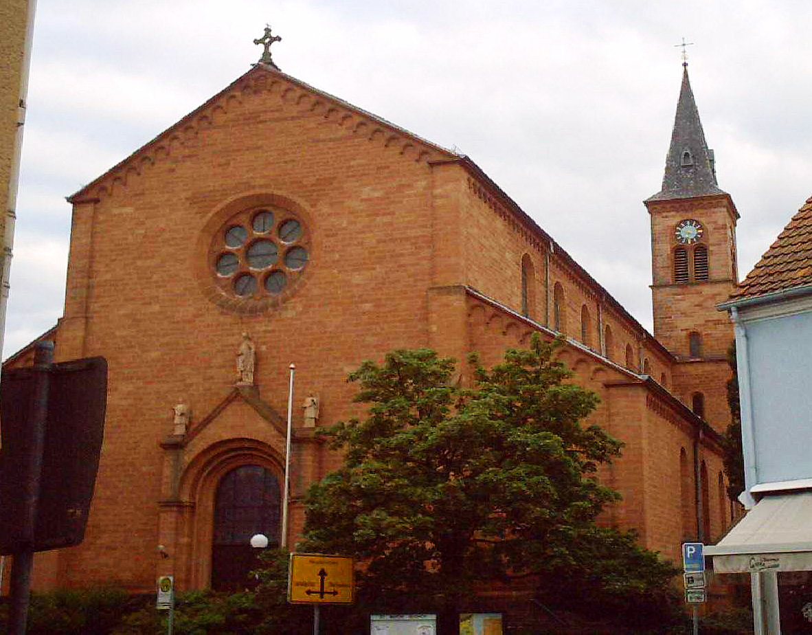 St. Martin, Bexbach